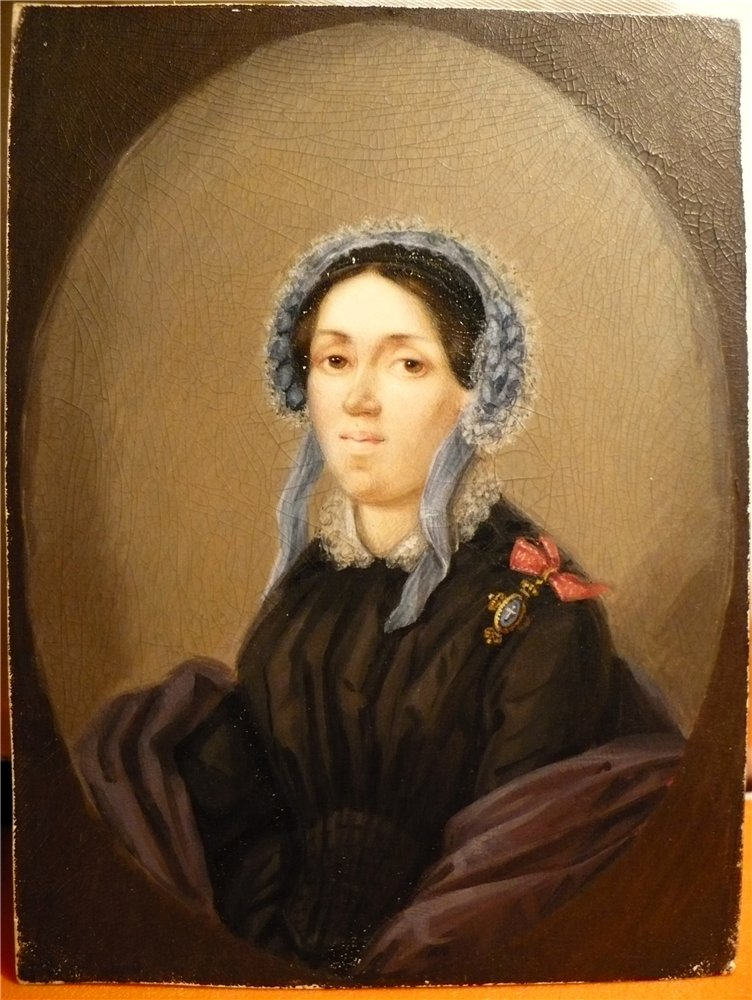 14,5 х 10,8, н/х.